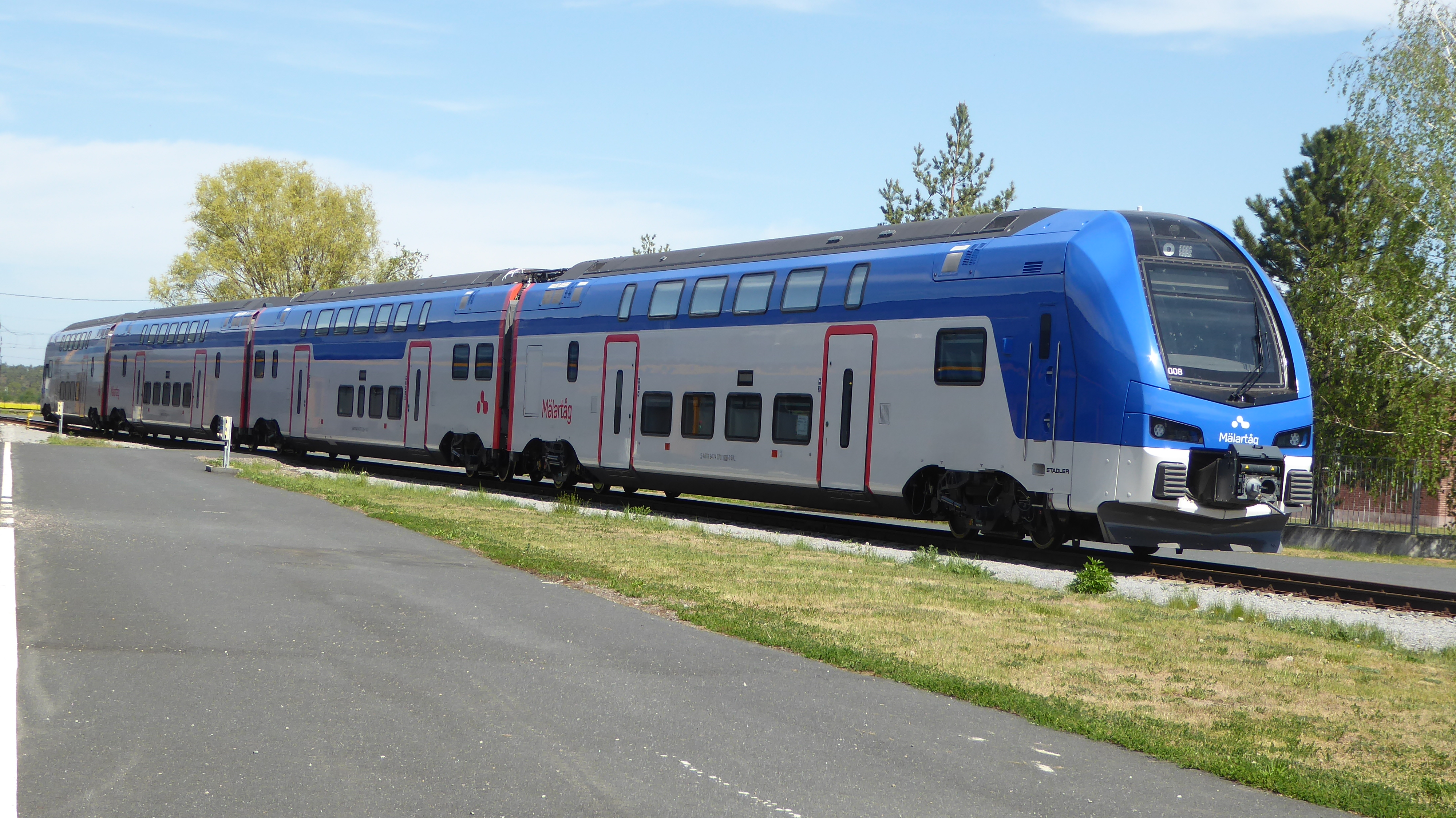 Stadler KISS des schwedischen Verkehrsunternehmens Mälardalstrafik (ABTR) 94 74 0701 608-0 auf dem Eisenbahnversuchsring in Velim (CZ)